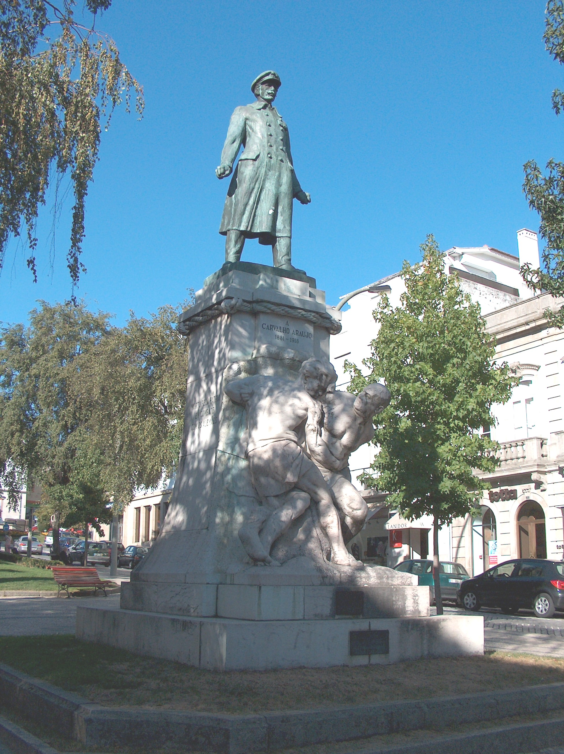 Descrição Estátua a Carvalho Araújo (da autoria do escultor, Artur Anjos Teixeira), concelho de Vila Real, Distrito de Vila Real Fonte Carregada pelo autor Autor João Carvalho